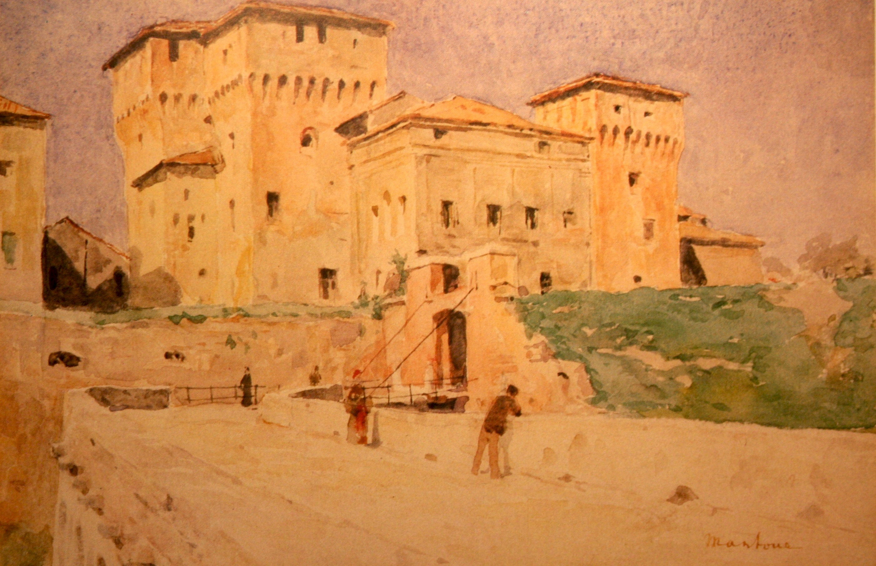 Albert Anker: Castello San Giorgio in Mantua, 1891, Aquarell, Privatbesitz